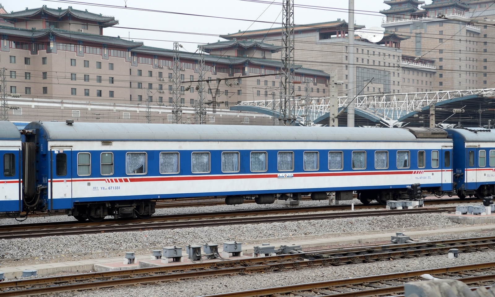 T167/168次特快列车编组中的YW25K硬卧车，使用铺镇厂209HS型转向架，车门采用密闭式塞拉门，拍摄于北京西客站